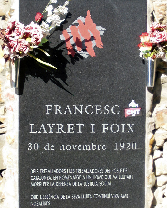 Tomba Francesc Layret a Montjuïc. Francesc Layret i Foix (Barcelona, 10 de juliol de 1880 - 30 de novembre de 1920) fou un polític i advocat català. Fill de família benestant, va haver d'utilitzar durant tota la seva vida crosses ja que en la seva infantesa es va veure afectat per una paràlisi.